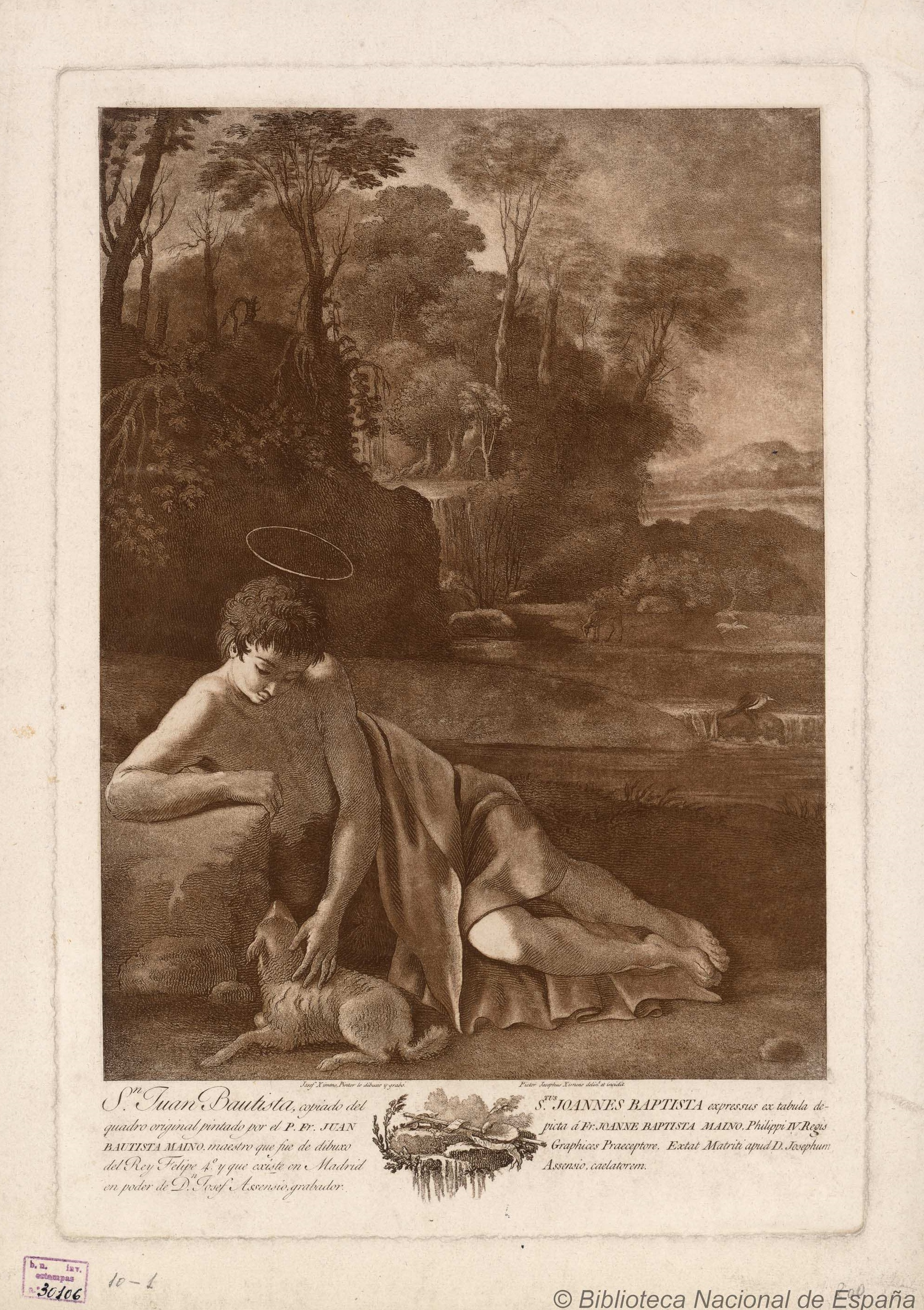 San Juan Bautista, copiado del quadro original pintado por el P. Fr. Juan Bautista Maino, maestro que fue de dibuxo del rey Felipe 4.º y que existe en Madrid en poder de Dn Josef Assensio grabador. Josef Ximeno lo dibuxó y grabó . Biblioteca Nacional de España